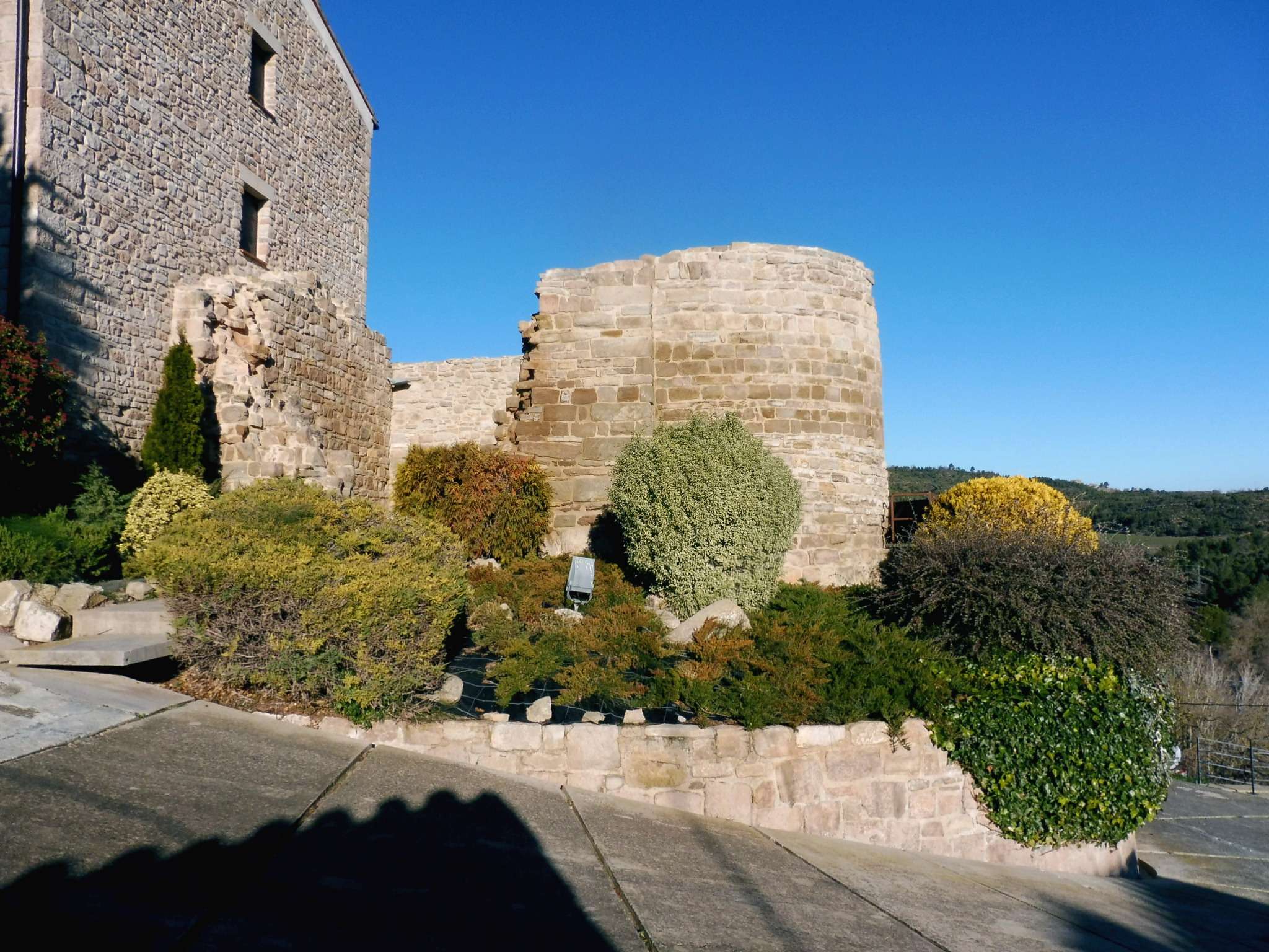 Castell de Veciana. al darrere de l'església de Sant Miquel